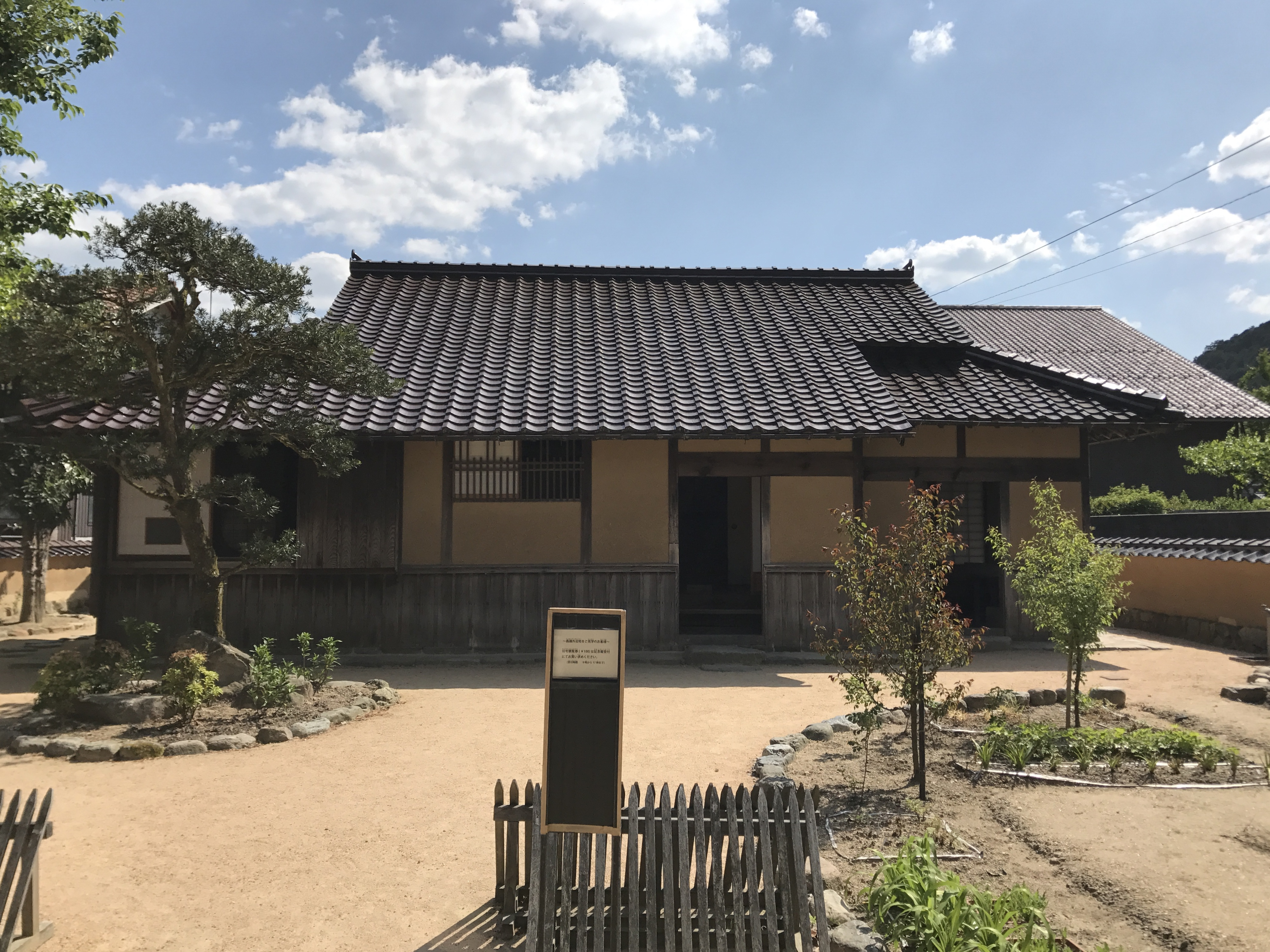 森鴎外生家